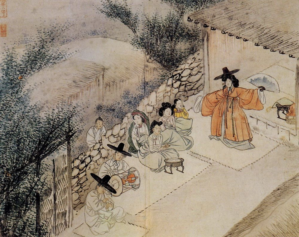 무녀신무 (巫女神舞) '혜원풍속도첩 (蕙園風俗圖帖)' 중에서, 서울 성북구 간송미술관 소장